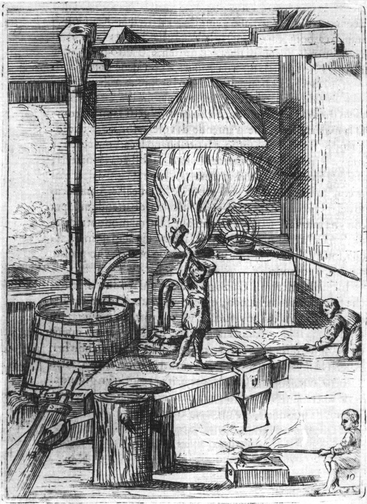 Pratica Minerale. Focolare di riduzione della ghisa, tromba e maglio.